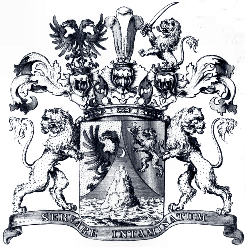 Wappen der Freiherrn Sina von Hodos und Kisdia, 1838